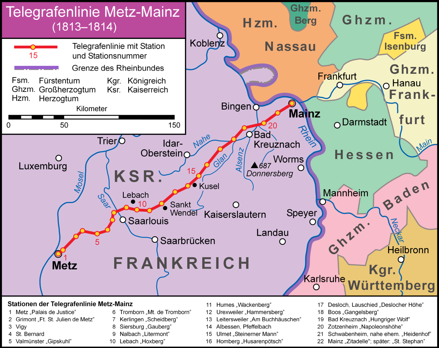 Verlauf der Optischen Telegrafenlinie Metz–Mainz 1813/14